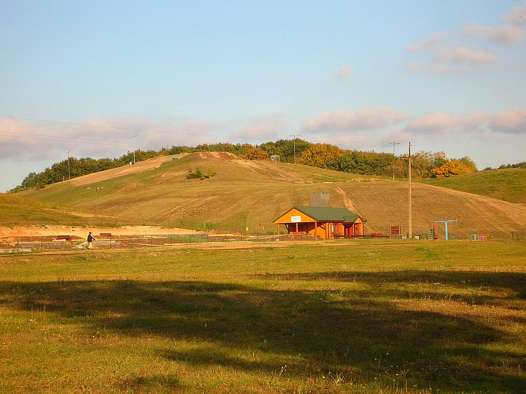 Zbocze pradoliny w Myślęcinku